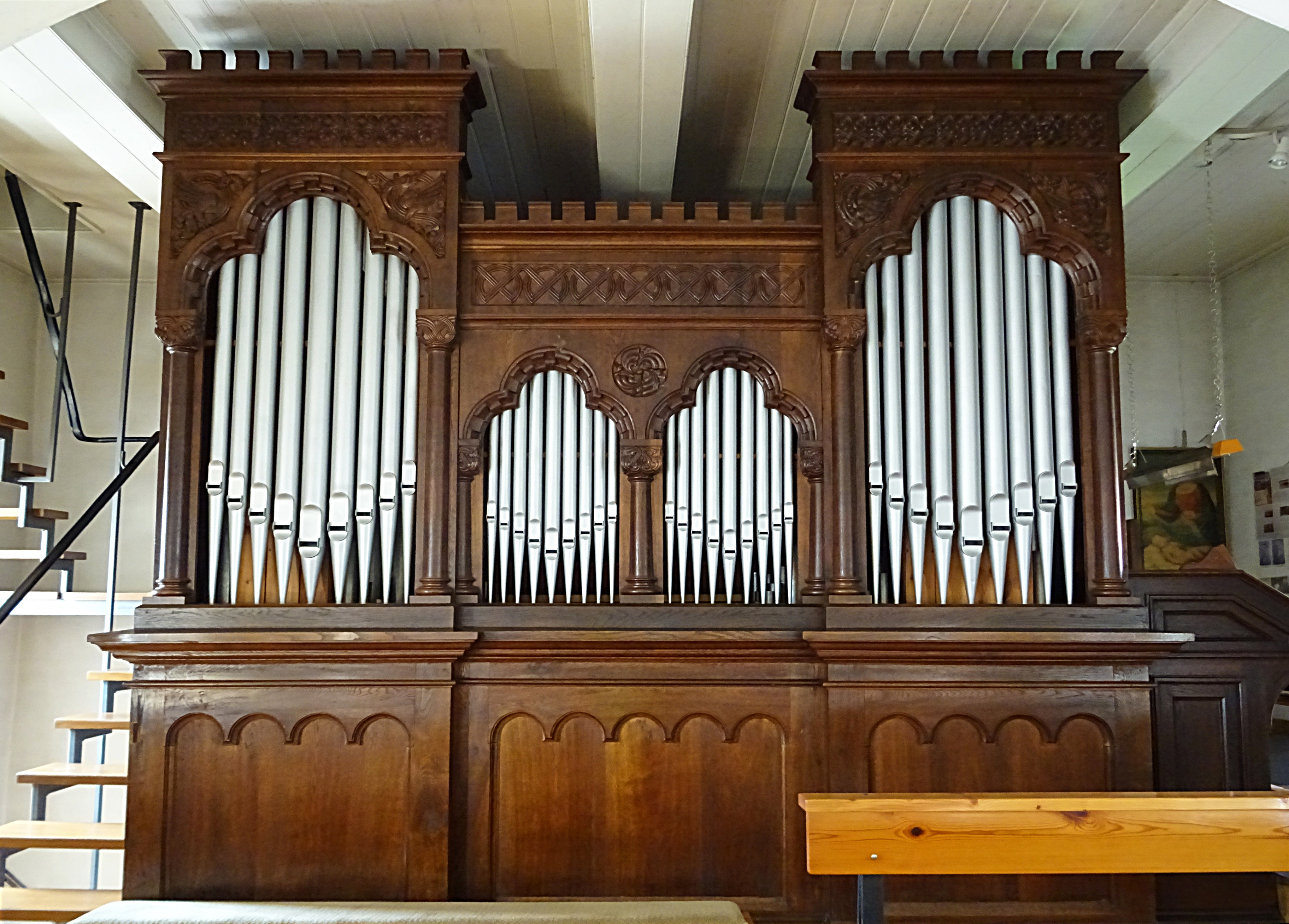 original erhaltene Orgel von Louis Krell (1903 IIP/18) in der Dorfkirche St. Georg (Günterode)